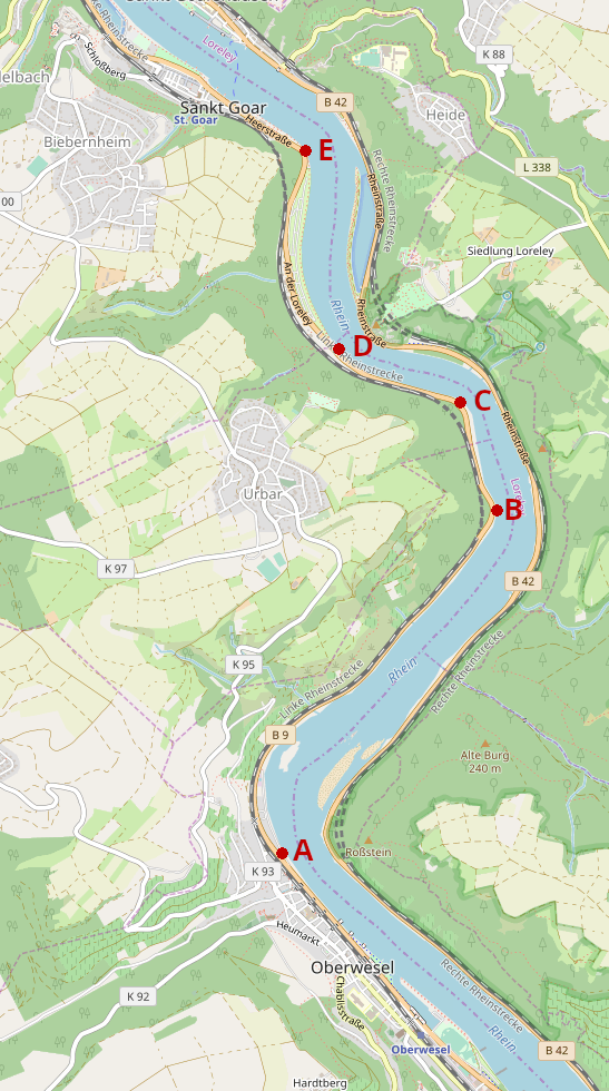 Lageplan Wahrschausignalstellen am Mittelrhein This map may be incomplete, and may contain errors. Don't rely solely on it for navigation.